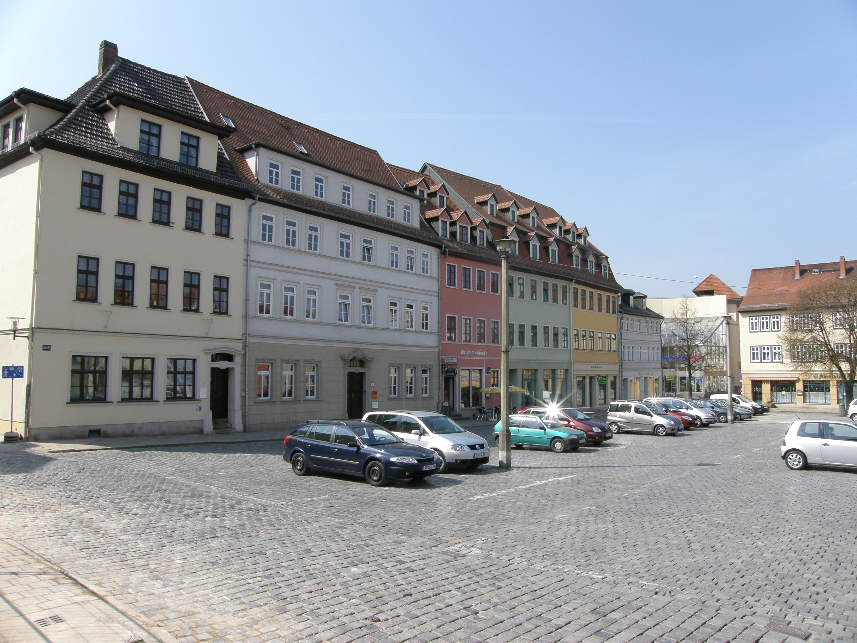 Stadt Apolda - Markt